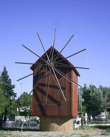 Ο μύλος στο κέντρο της Νέας Μεσημβρίας